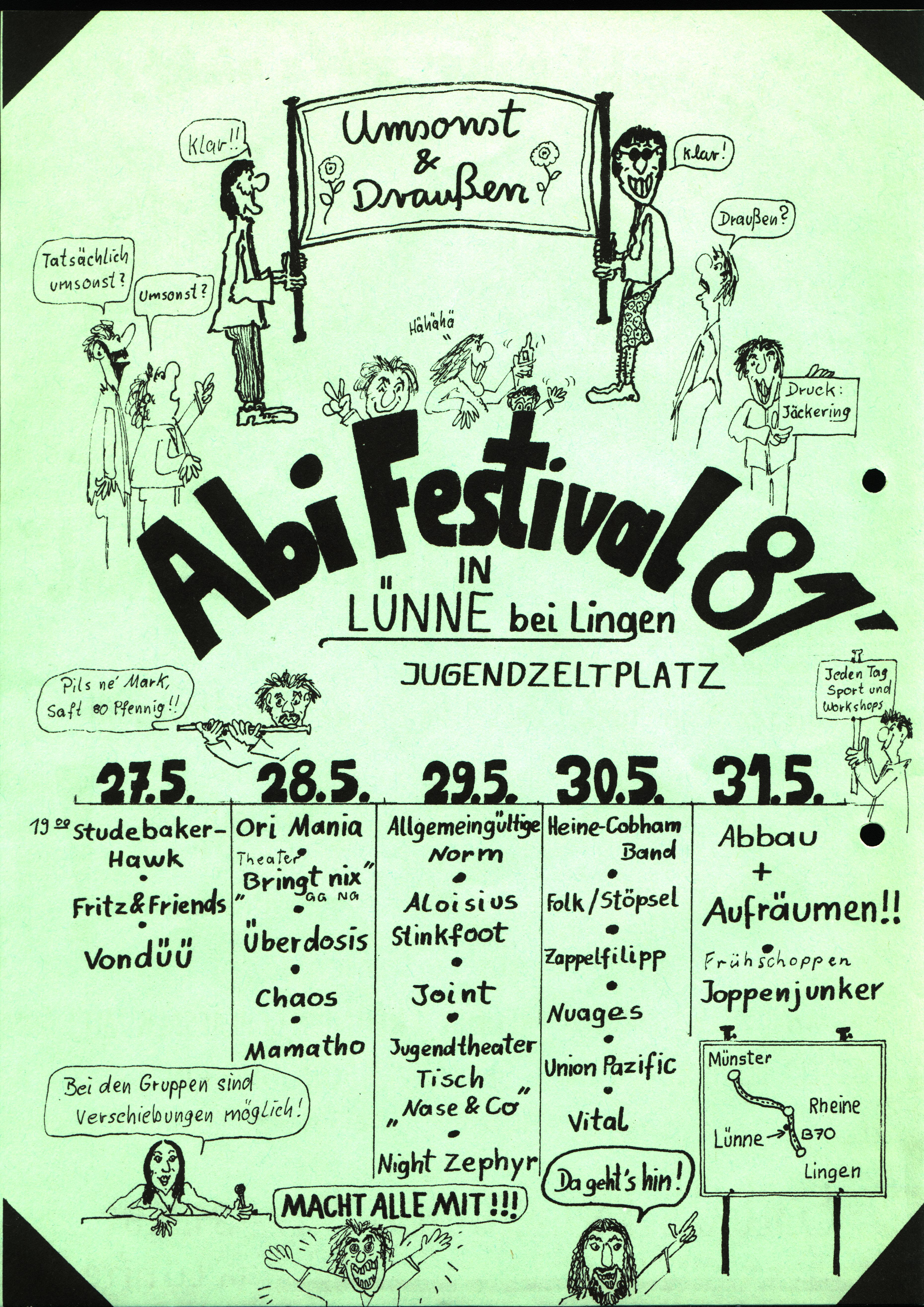 Plakat Abifestival von 1981